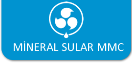 Azexpo